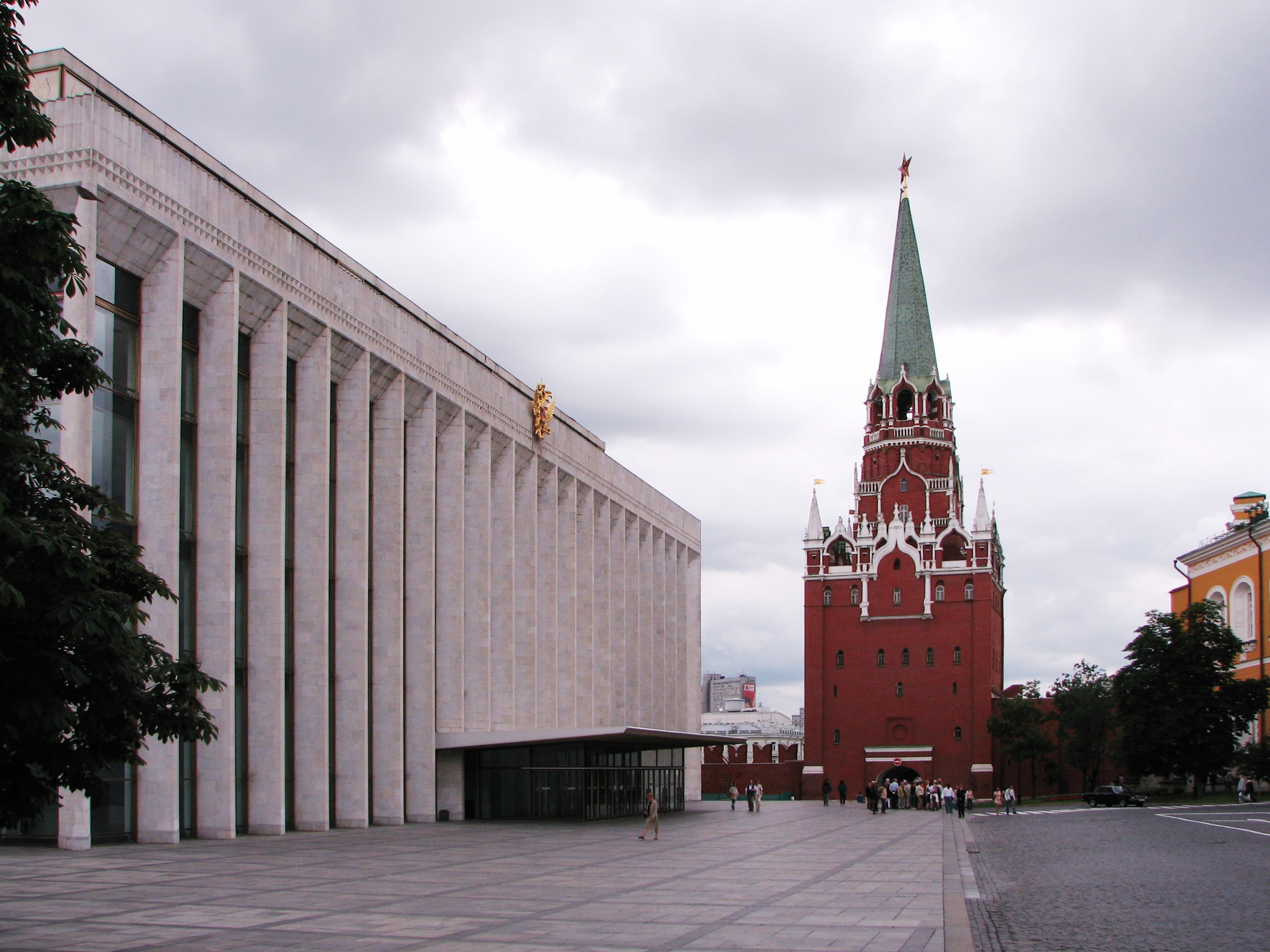 Troitskaya Tower and State Kremlin PalaceLa tour Troitskaya et le palais des congrès